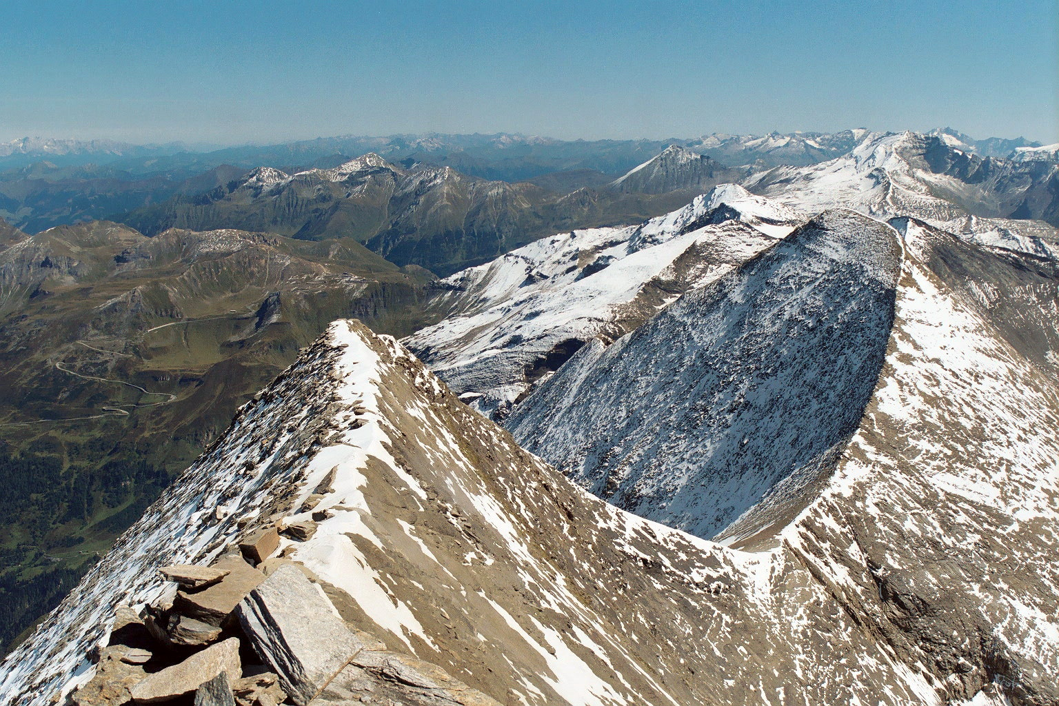 Grat vom Fuscherkarkopf zum Sinwelleck